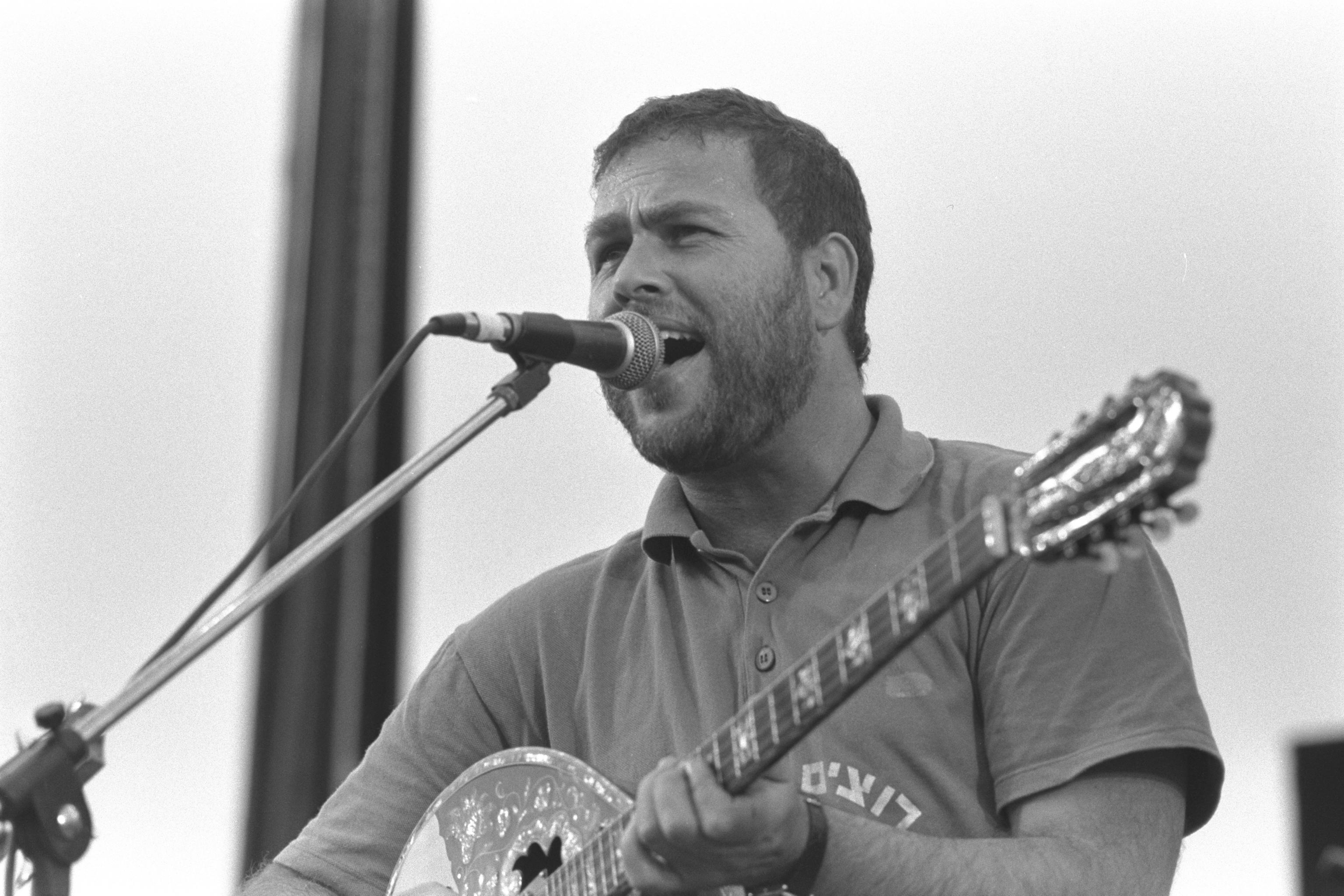 Yehuda Poliker singing at the Jewish Arab Peace Rally in Neve Shalom. יהודה פוליקר מופיע בפסטיבל השלום בנווה שלום